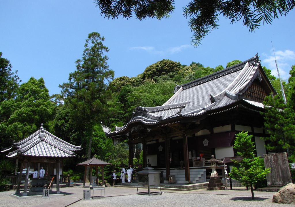 延光寺境内（高知県宿毛市）